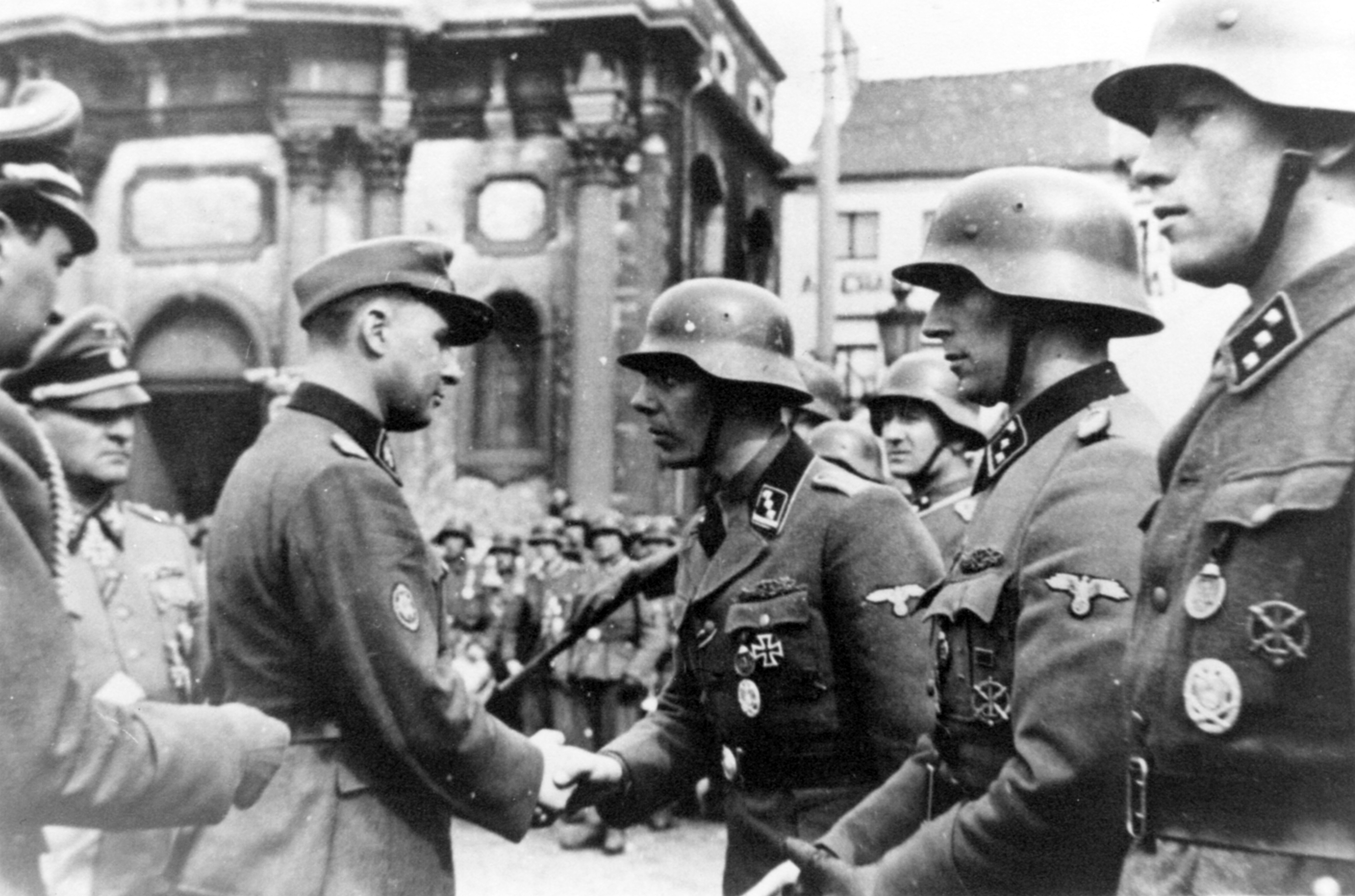 Léon Degrelle sur la place Charles II à Charleroi (Belgique), devant l'église Saint-Christophe. 1 avril 1944 De gauche à droite : Roger Wastiau Josef Dietrich Léon Degrelle Marcel Lamproye Pascal Bovy Marcel Bonniver Jean-Marie Lantier Source : William Theys et Jean-Louis Roba, Charleroi 1940-1945, Erpe, Éditions De Krijger, coll. « La Belgique en Guerre / Hier et aujourd'hui » (no 1), 2000, 96 p., p. 66-67 (ISBN 90-72547-92-6) - photo non créditée dans l'ouvrage, l'auteur est inconnu/anonyme.